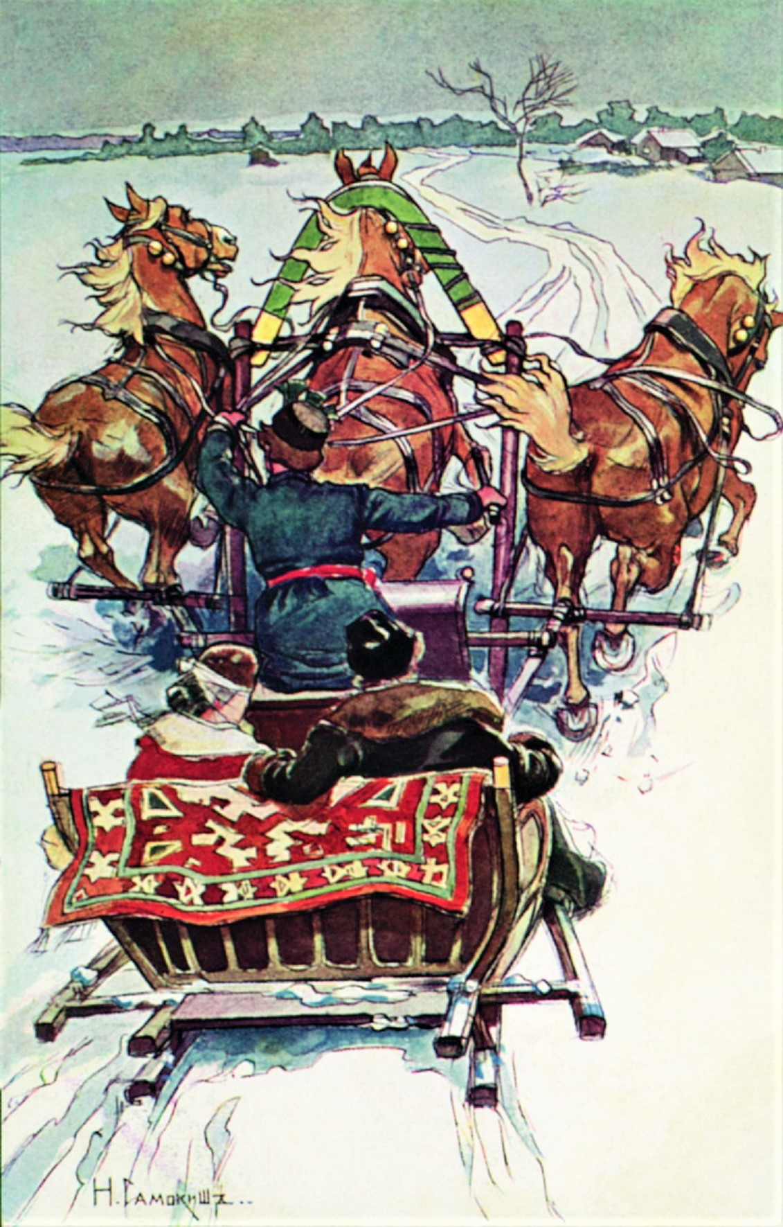 Николай Самокиш. Катанье. Бурятский республиканский художественный музей им. Ц.С. Сампилова (Улан-Удэ)